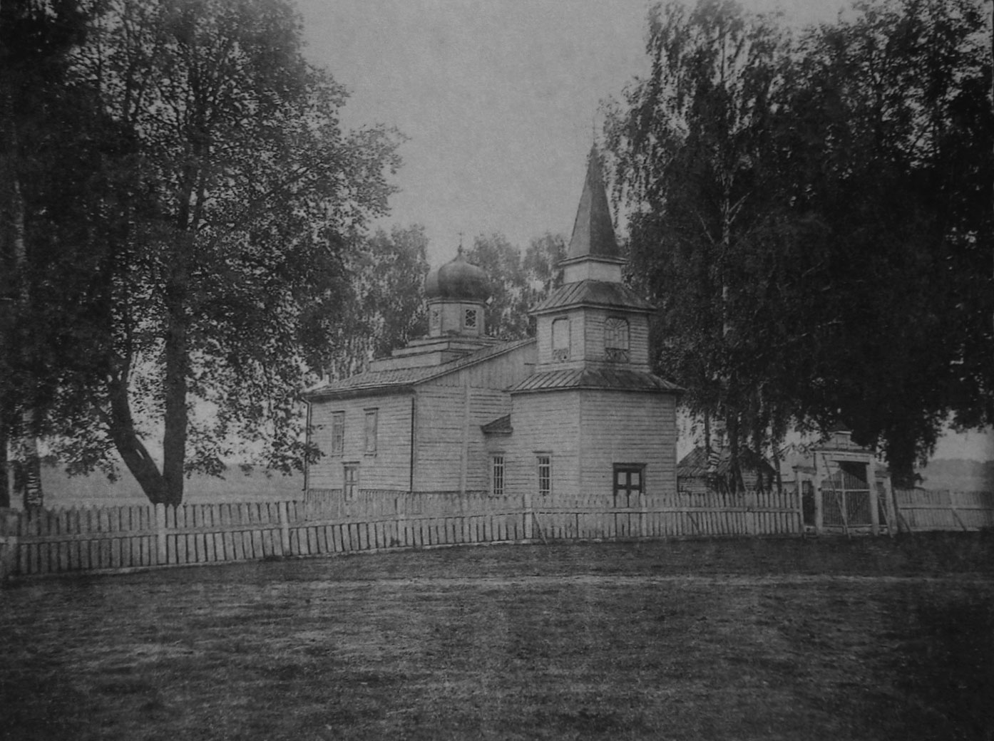 Беларуская (тарашкевіца): Бярэзань Горная (Biarezań Hornaja). Царква